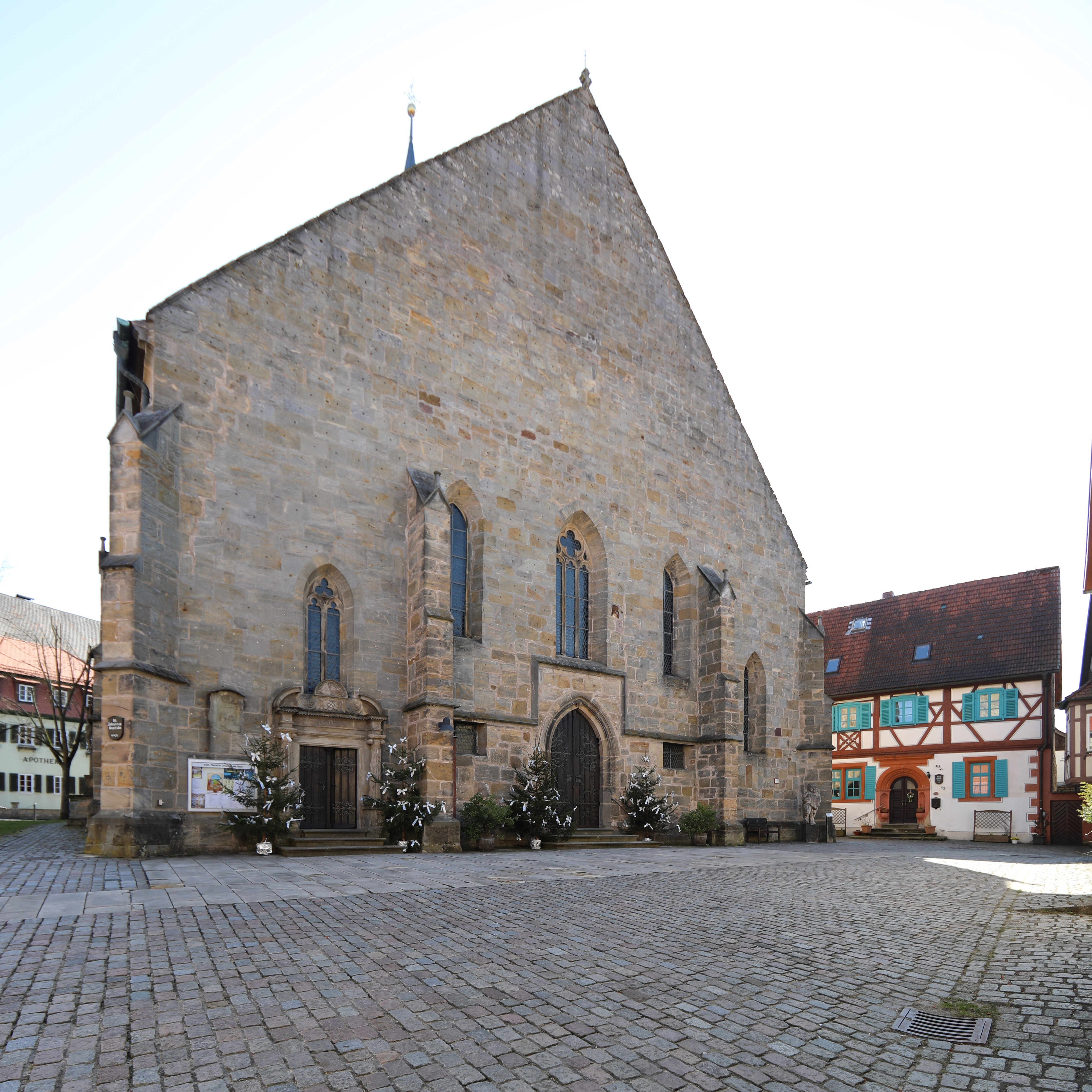 St. Johannes der Täufer, Seßlach